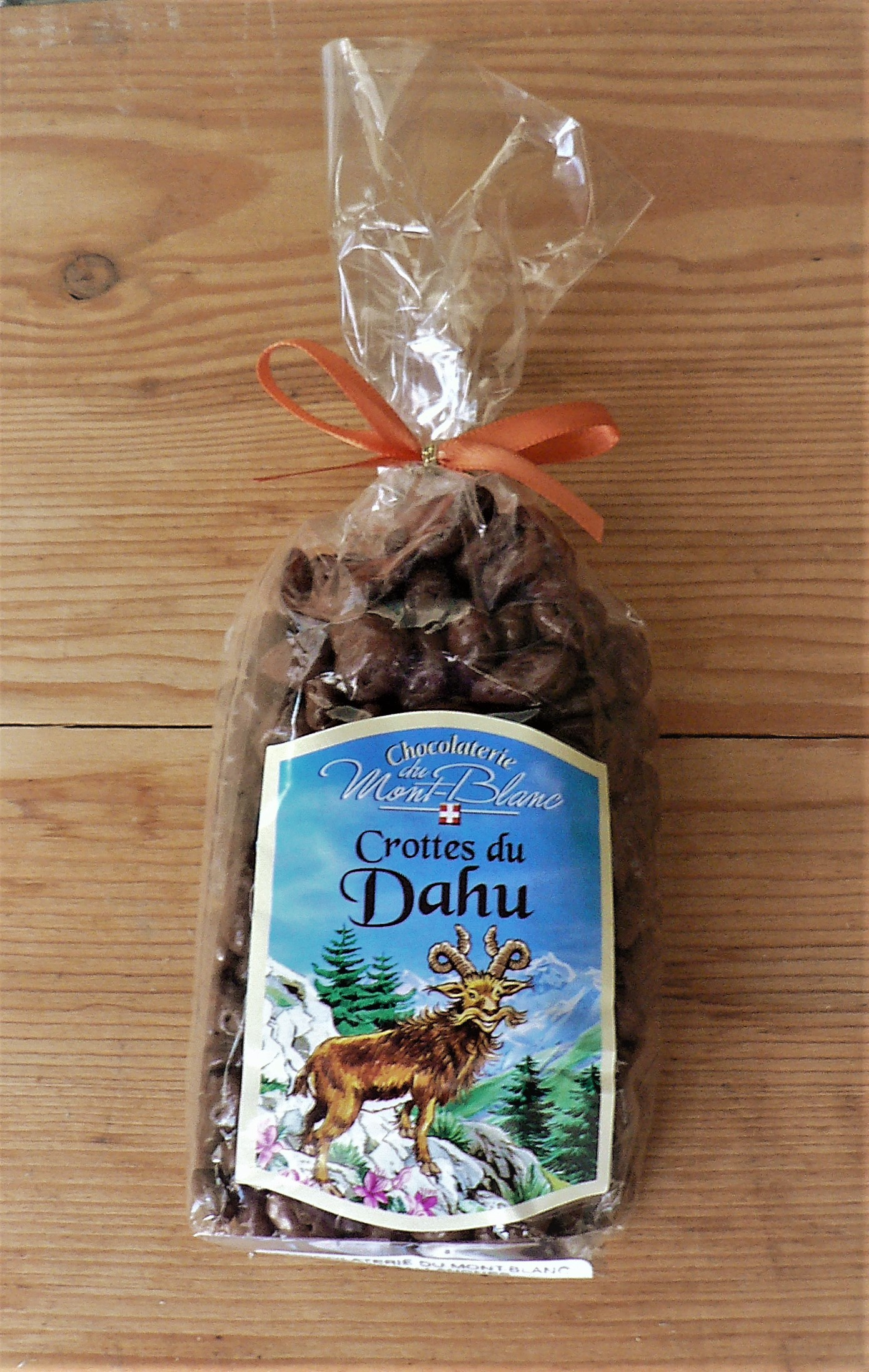 confiserie appelée "Crottes de Dahu", de la Chocolaterie du Mont Blanc de Sallanches, à la vente au supermarché à Grenoble. Des raisins enrobés de chocolat au lait au nom évocateur.Le marketing de ces crottes est basé sur l'humour scatologique (et la moquerie aux enfants sur l'existence "scientifiquement prouvé par les crottes" du Dahu, animal mythologique).